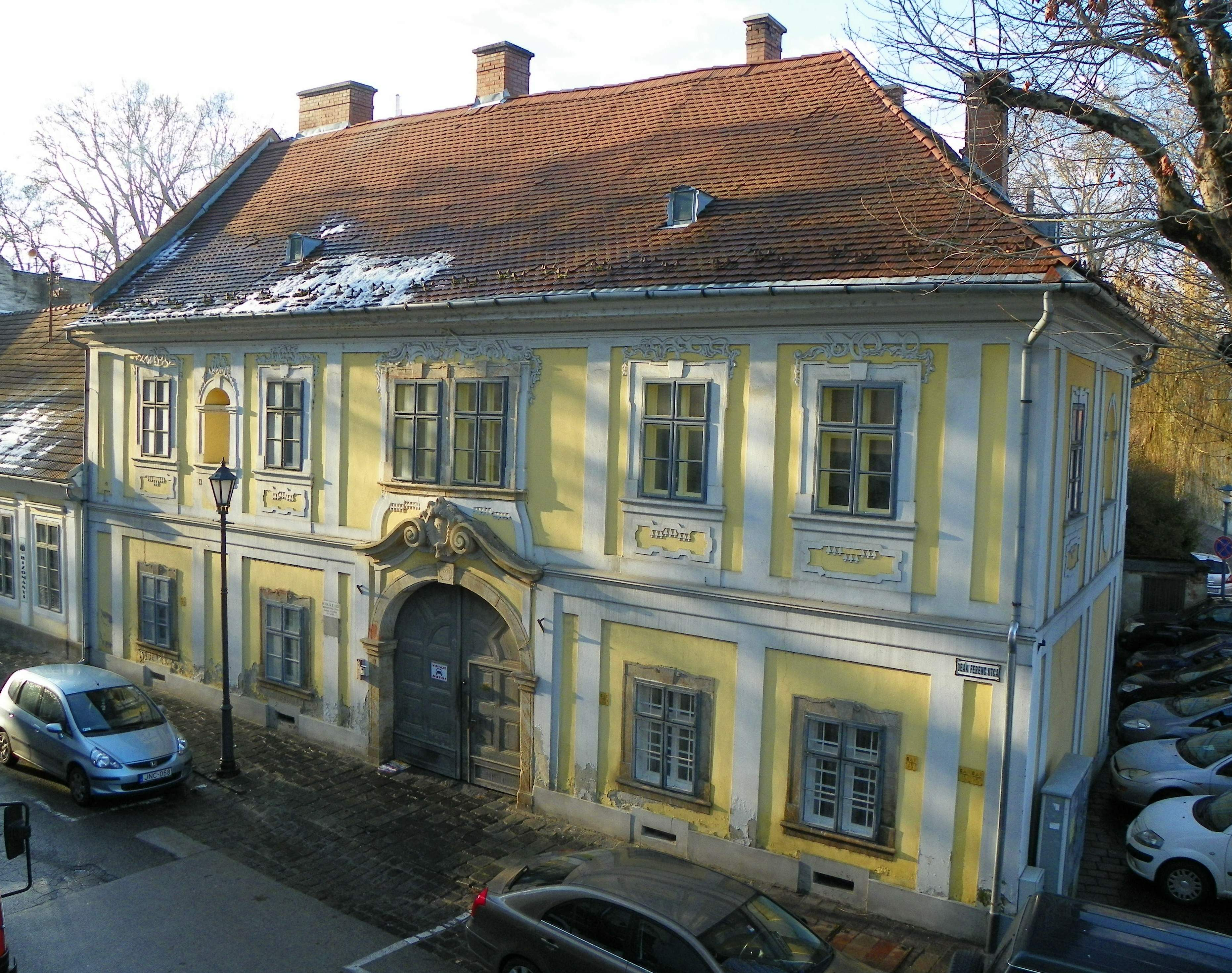 Az Obermayer-ház. Zártsorú beépítésben álló, L alaprajzú, egyemeletes, nyeregtetős saroképület. Félköríves záródású, kőkeretes, volutával lezárt kapu, benne címerrel és 1767-es évszámmal. jellemzően 19. századi nyílászárók. Épült, korábbi, 1721-ben már álló épület felhasználásával 1767-ben. Építtette Kinczel Lőrinc (építész: Oracsek Ignác). Átalakítva a 19. században és az 1930-as években. - Komárom-Esztergom m., Esztergom, Deák Ferenc utca 1-3. Forrás: muemlekem.hu This is a photo of a monument in Hungary, Identifier: 6179